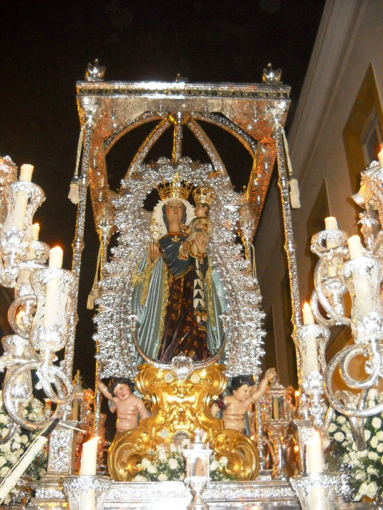 Virgen de la Hiniesta Gloriosa, titular de la hermandad de la Hiniesta y patrona del Ayuntamiento de Sevilla, que procesiona la noche anterior al Corpus Christi